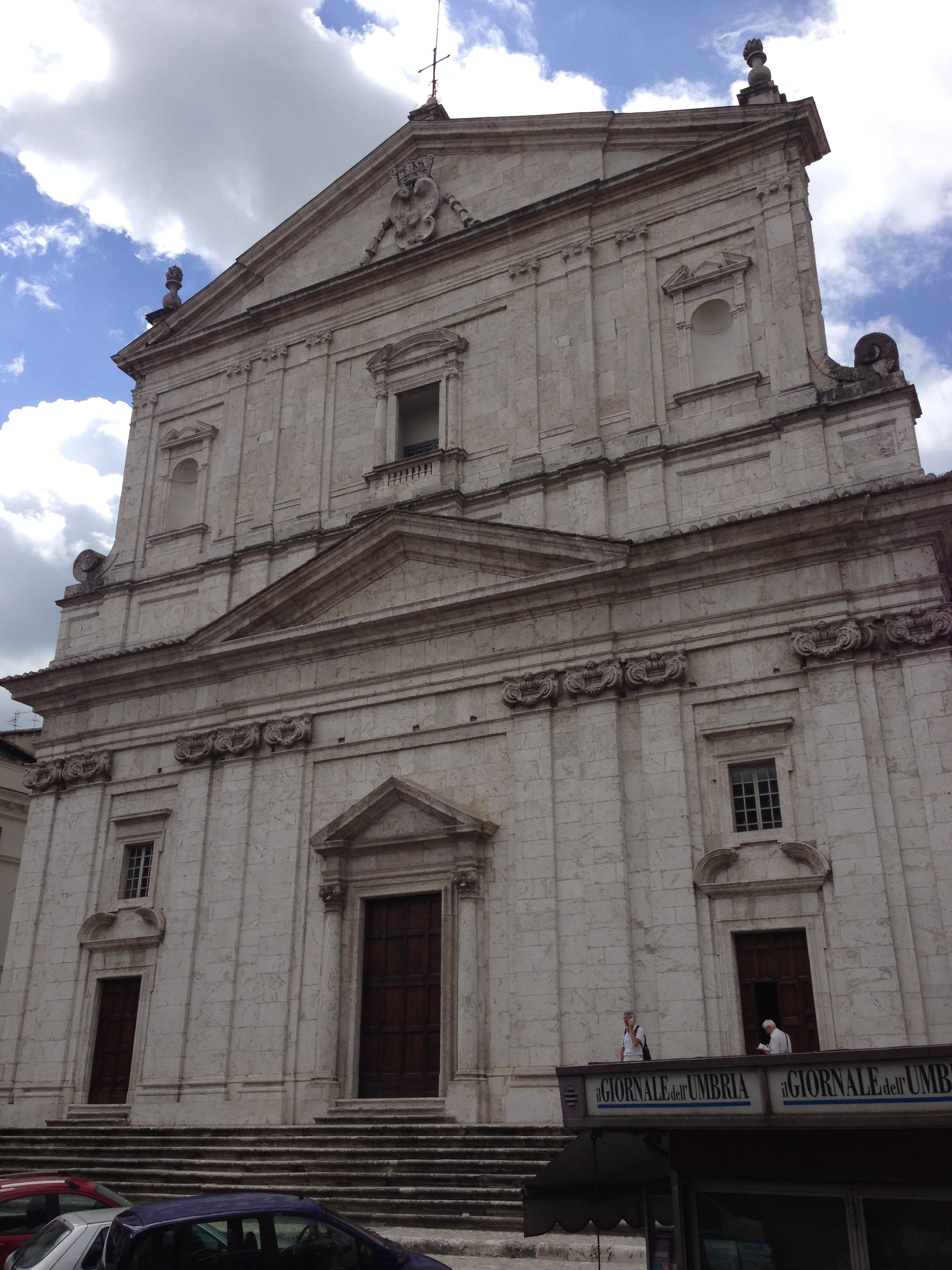 Chiesa di San Filippo Neri. Spoleto. Prospetto.